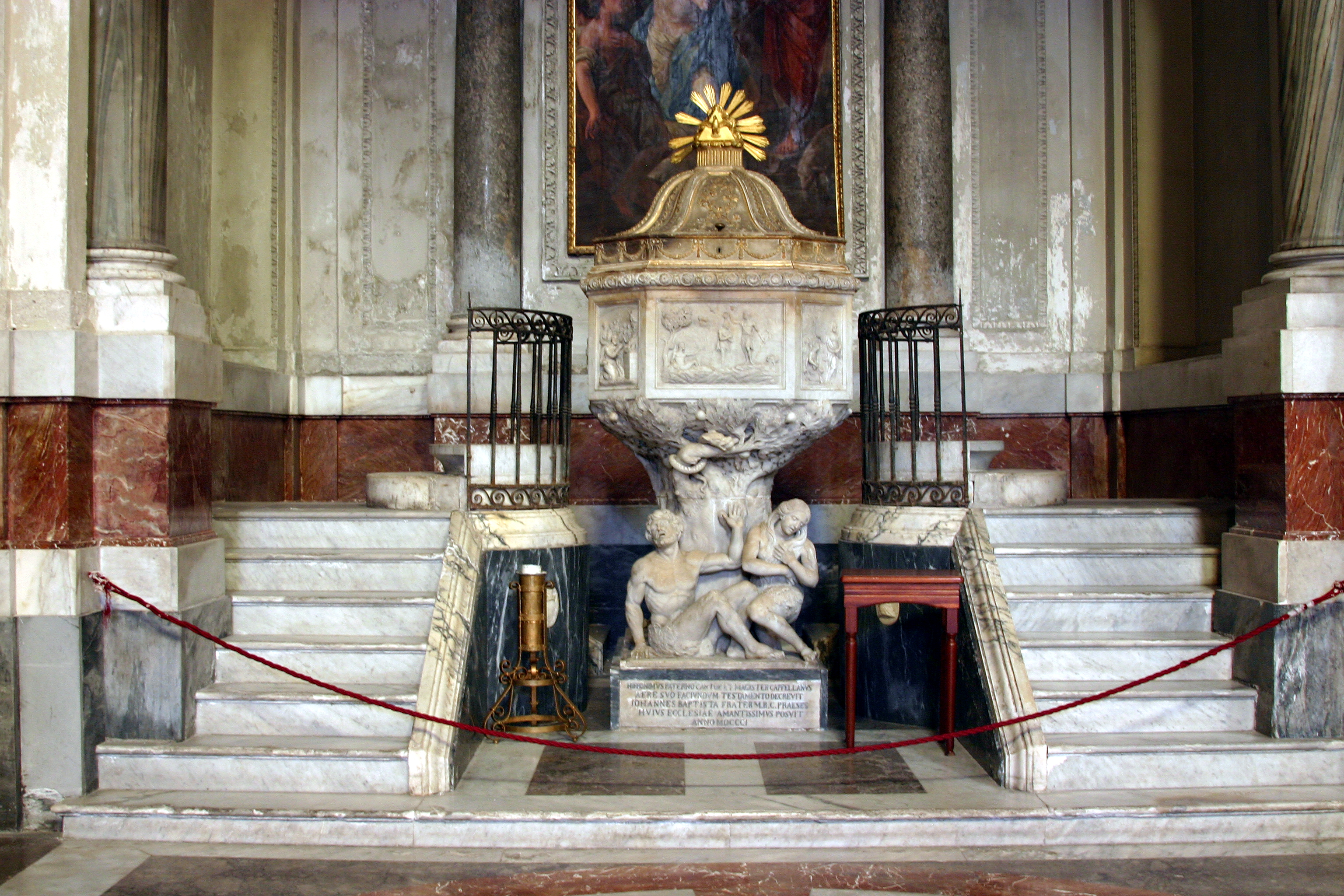 Cathedral of Palermo